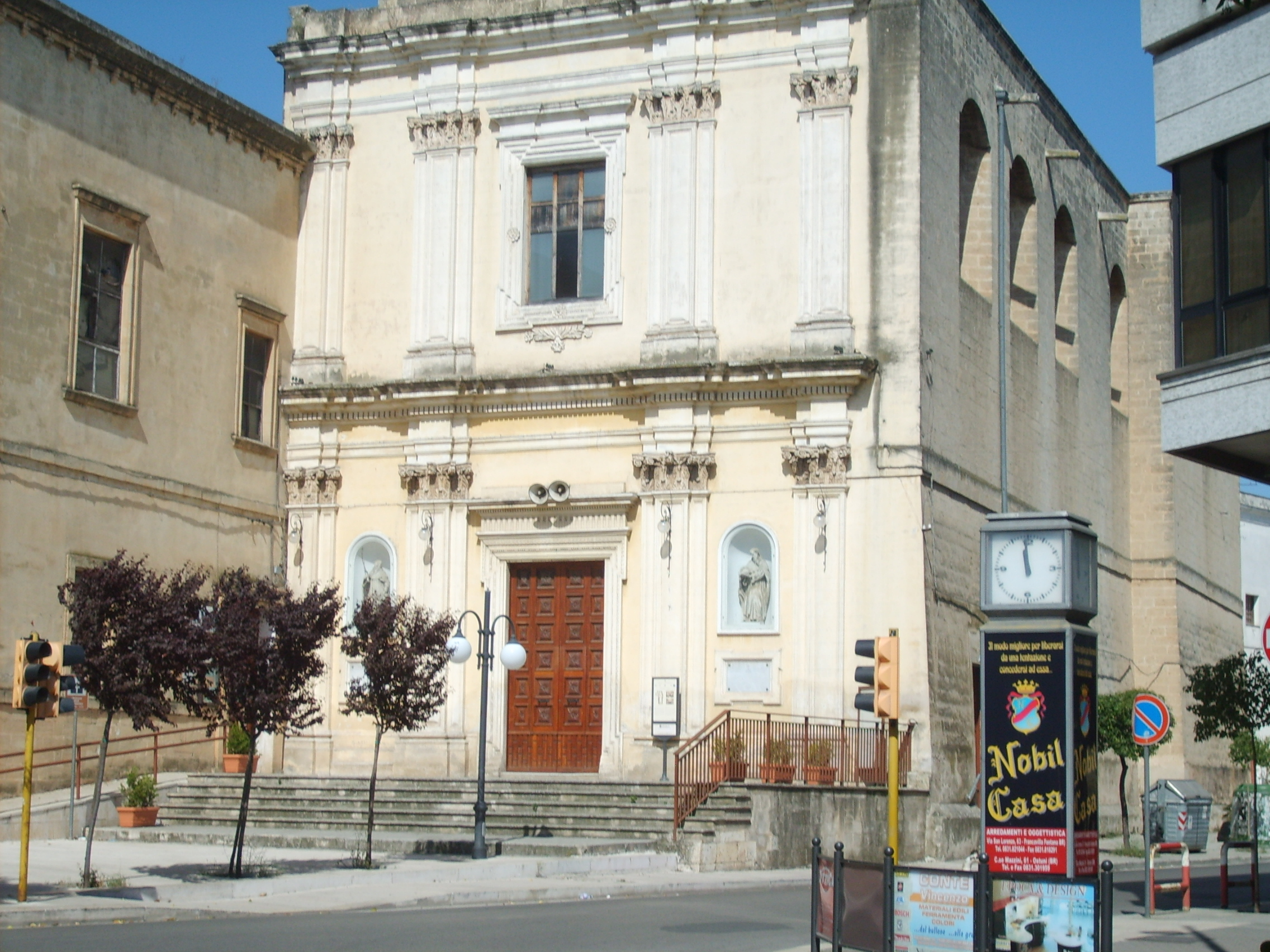 Chiesa del Carmine